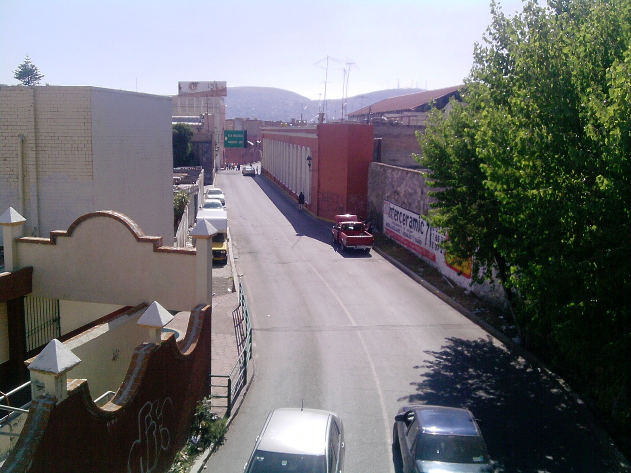 Calle de Pahuca